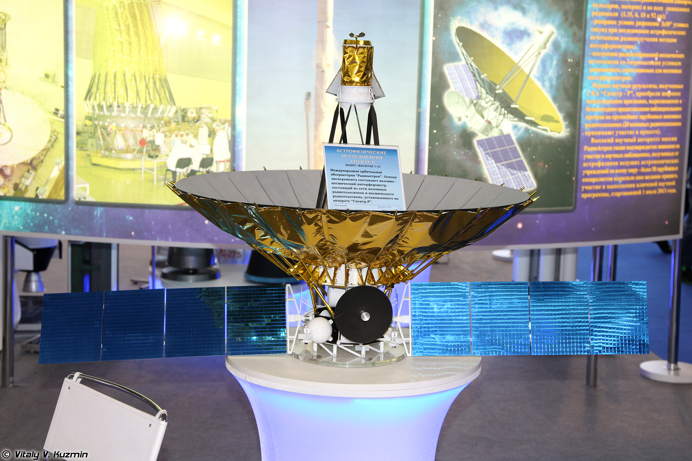 Космический аппарат Спектр-Р (Spektr-R spacecraft)